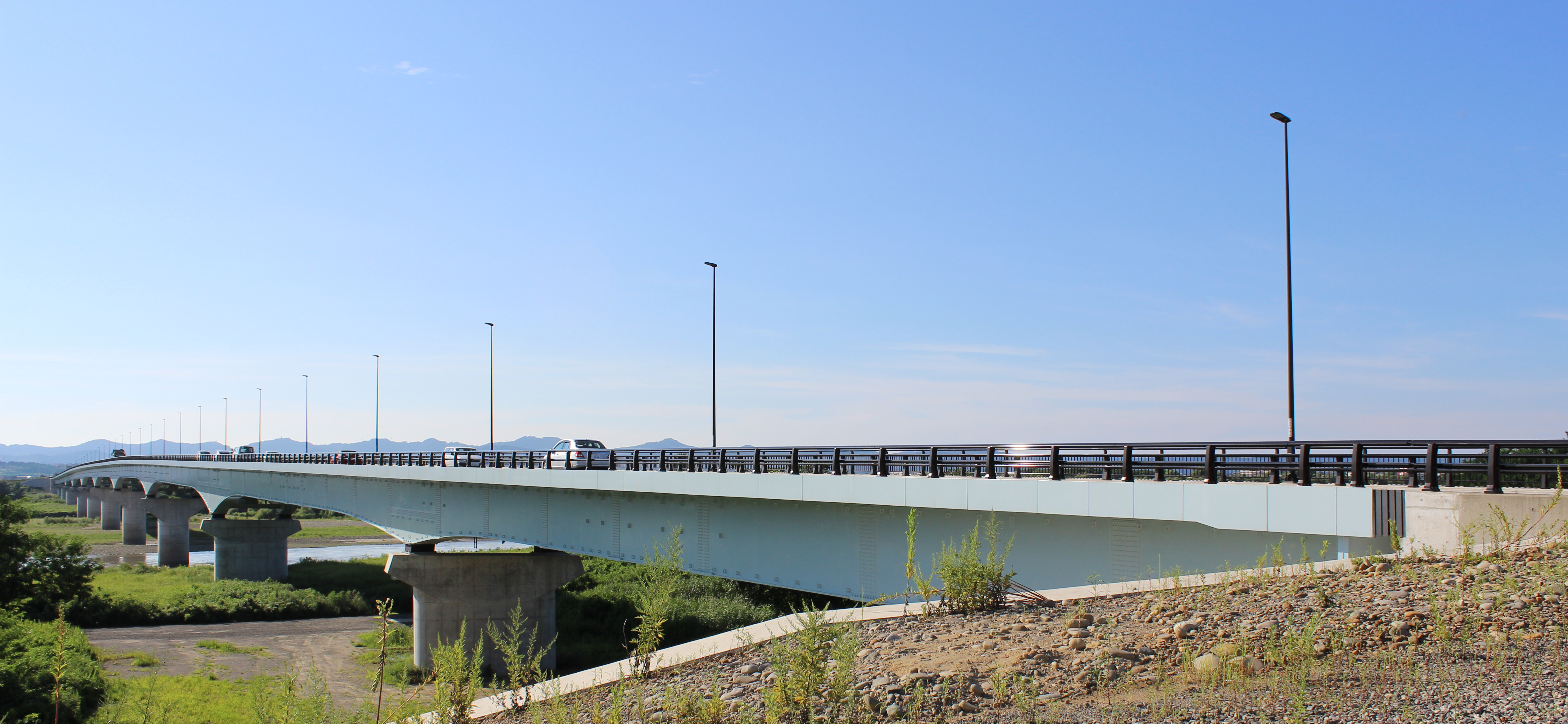 フェニックス大橋（東詰）。新潟県長岡市。2014年8月19日。